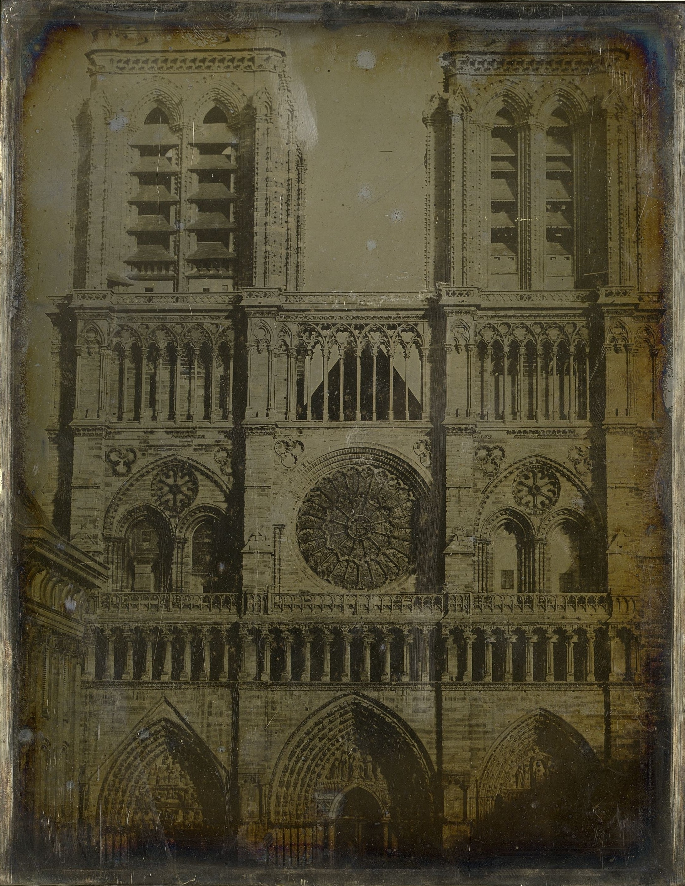 Cathédrale Notre-Dame de Paris : façade, par Girault de Prangey. pos. directe sur cuivre argenté : daguerréotype, n. et b. ; 23 x 17 cm (im.), 31,5 x 24,5 cm (sous-verre).